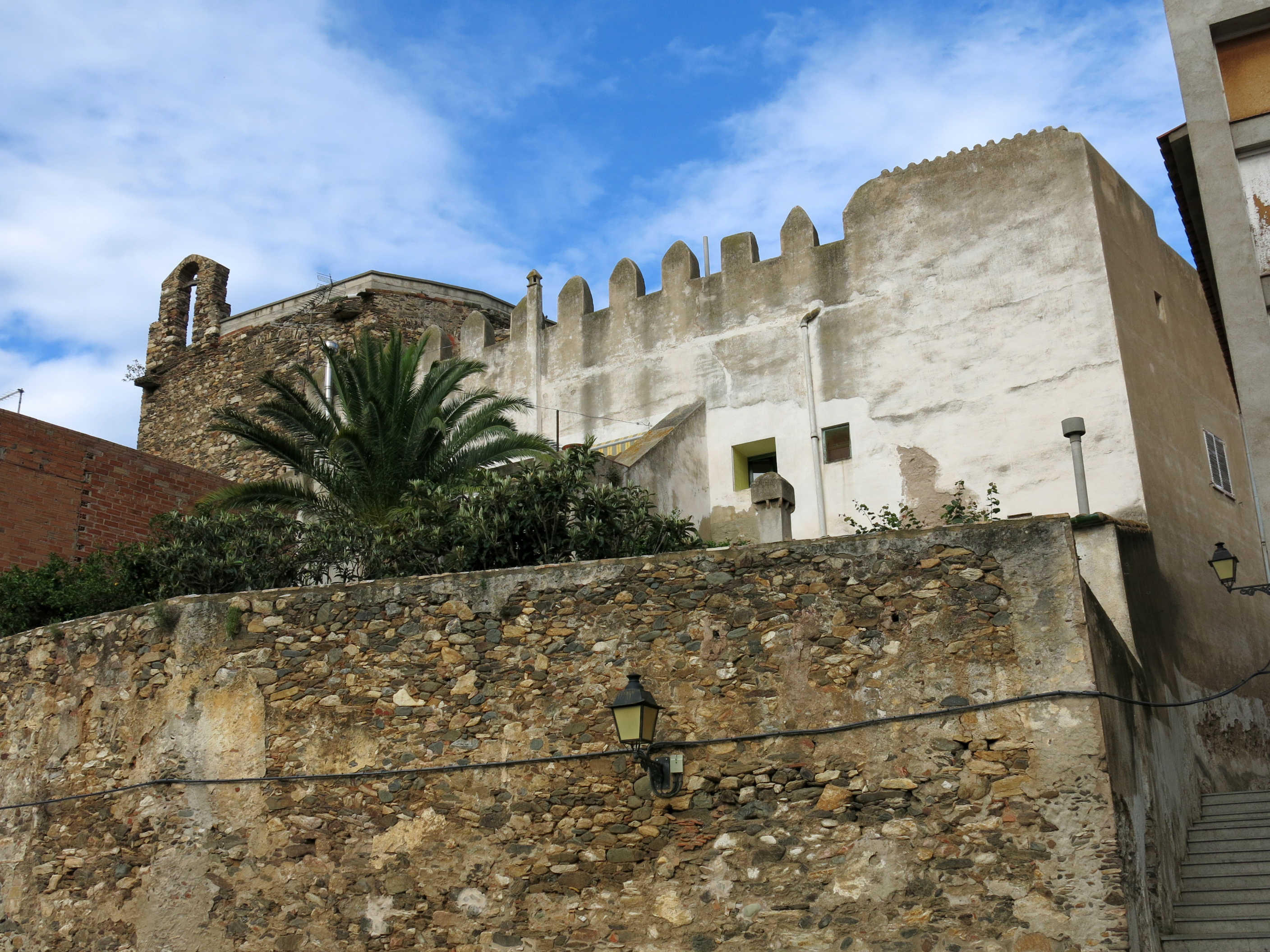 Torre (Llançà)